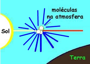 Porque é que o Céu é azul - Why the sky is blue